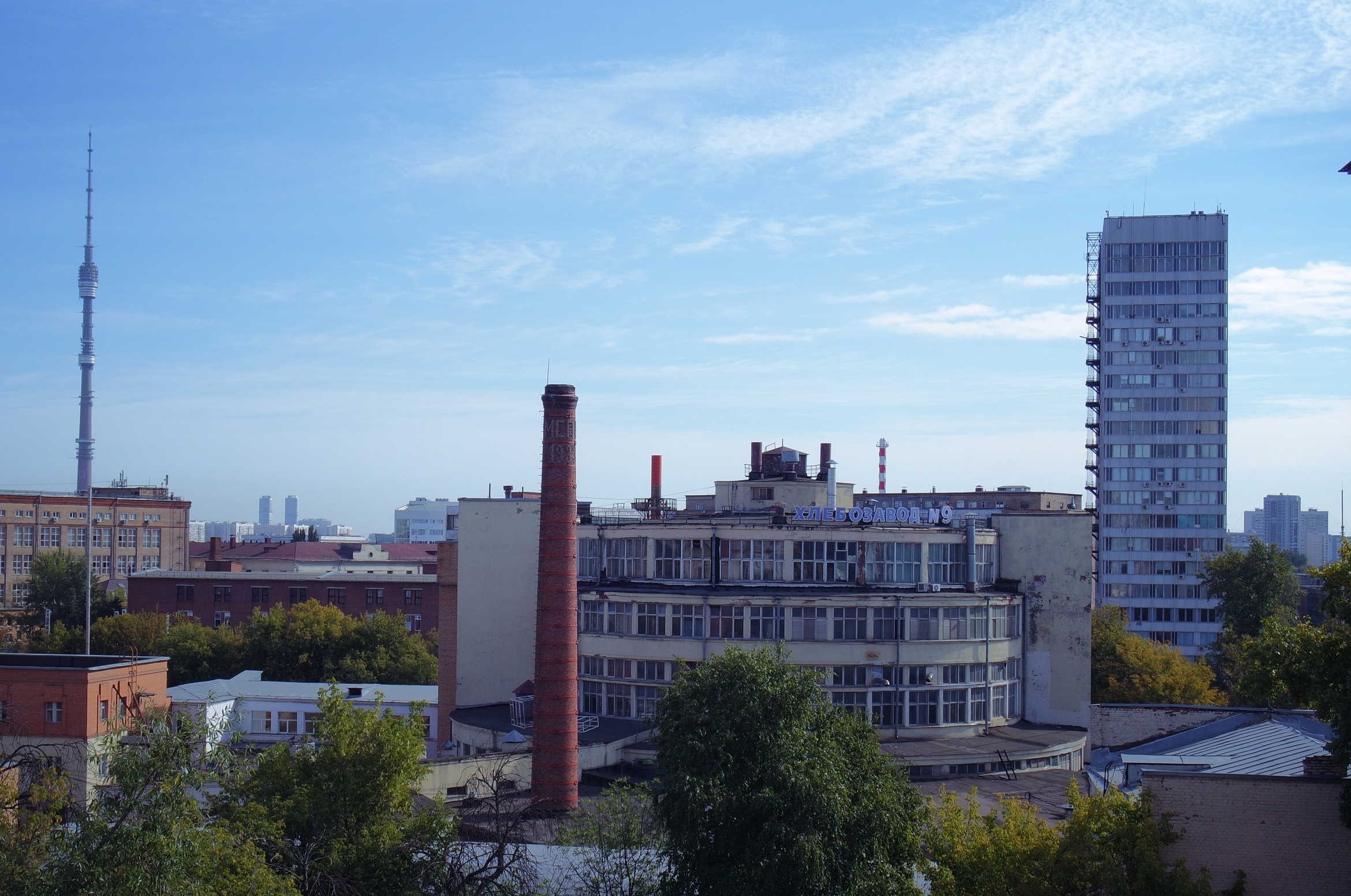 Вид со стороны улицы Бутырской по направлению Новодмитровской улицы в сторону Огородного проезда. Шпиль слева — Останкинская телебашня, круглое сооружение с середине — Хлебозавод № 9, высотный дом справа — здание издательства «Молодая гвардия»